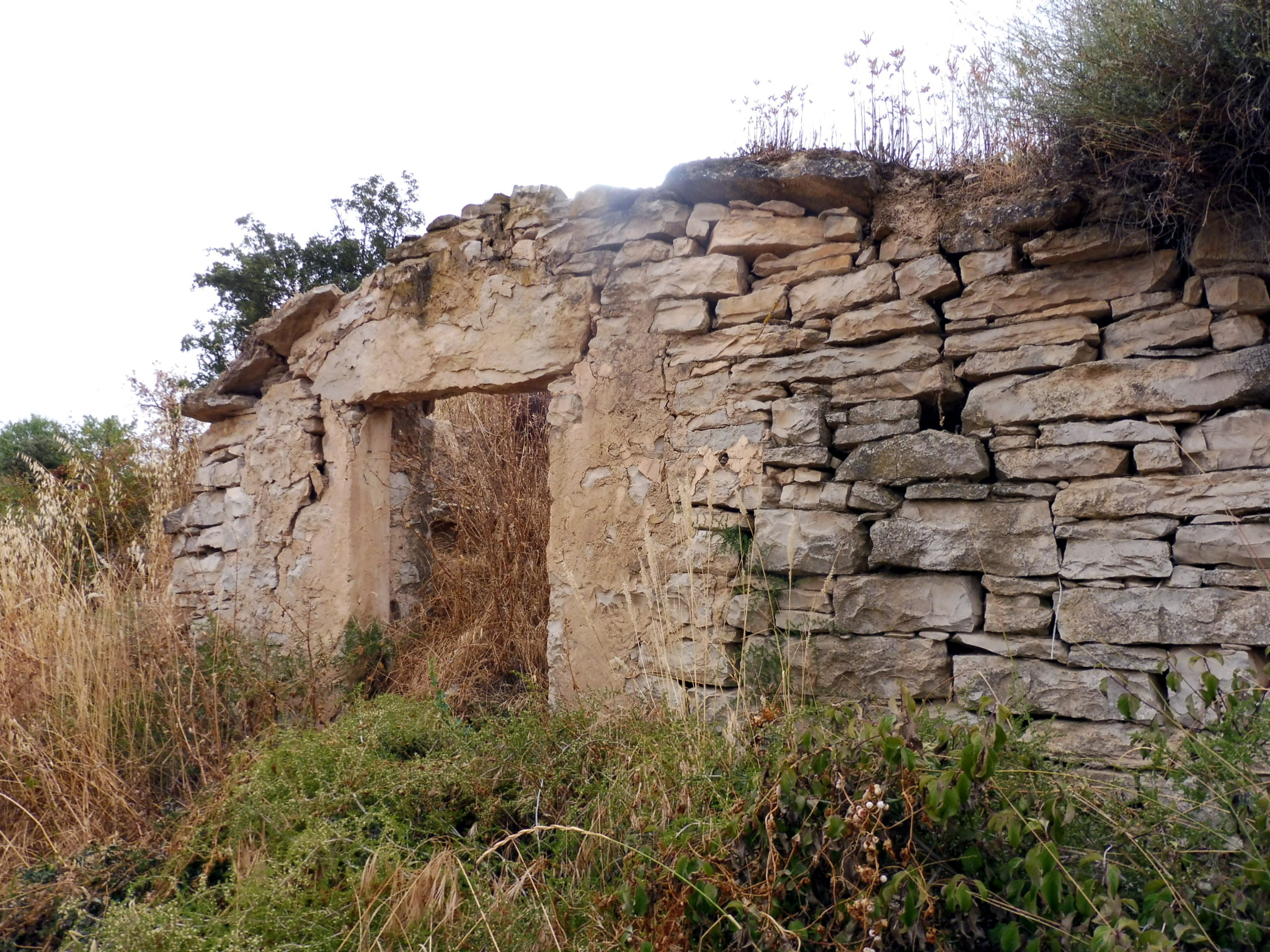 Cabana de volta de Cal Tomàs (Granyena de Segarra) This is a a photo of a natural area in Catalonia, Spain, with id: ES510254